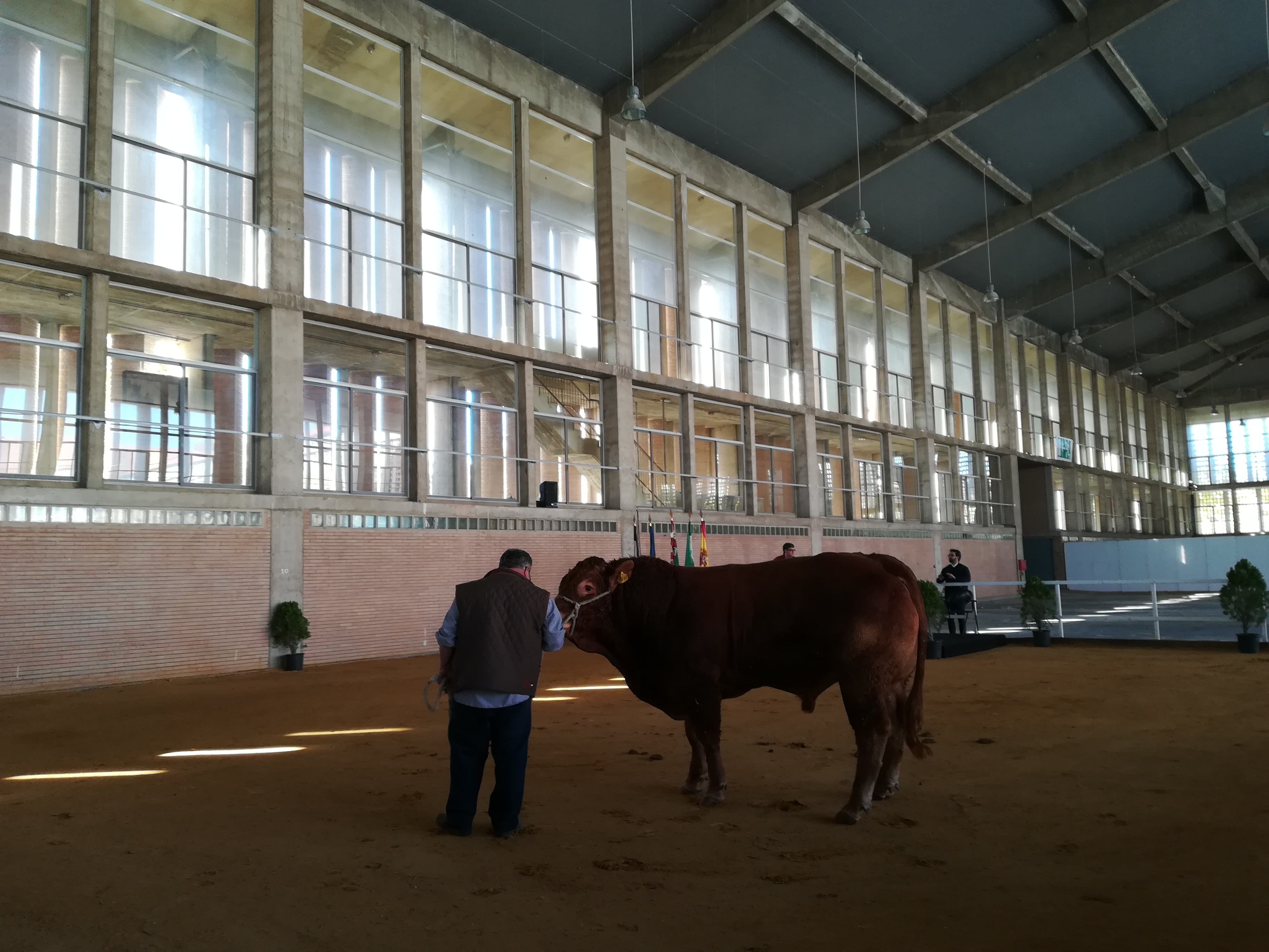 Subasta de ganado en FEGASUR 2019, Jerez de la Frontera.